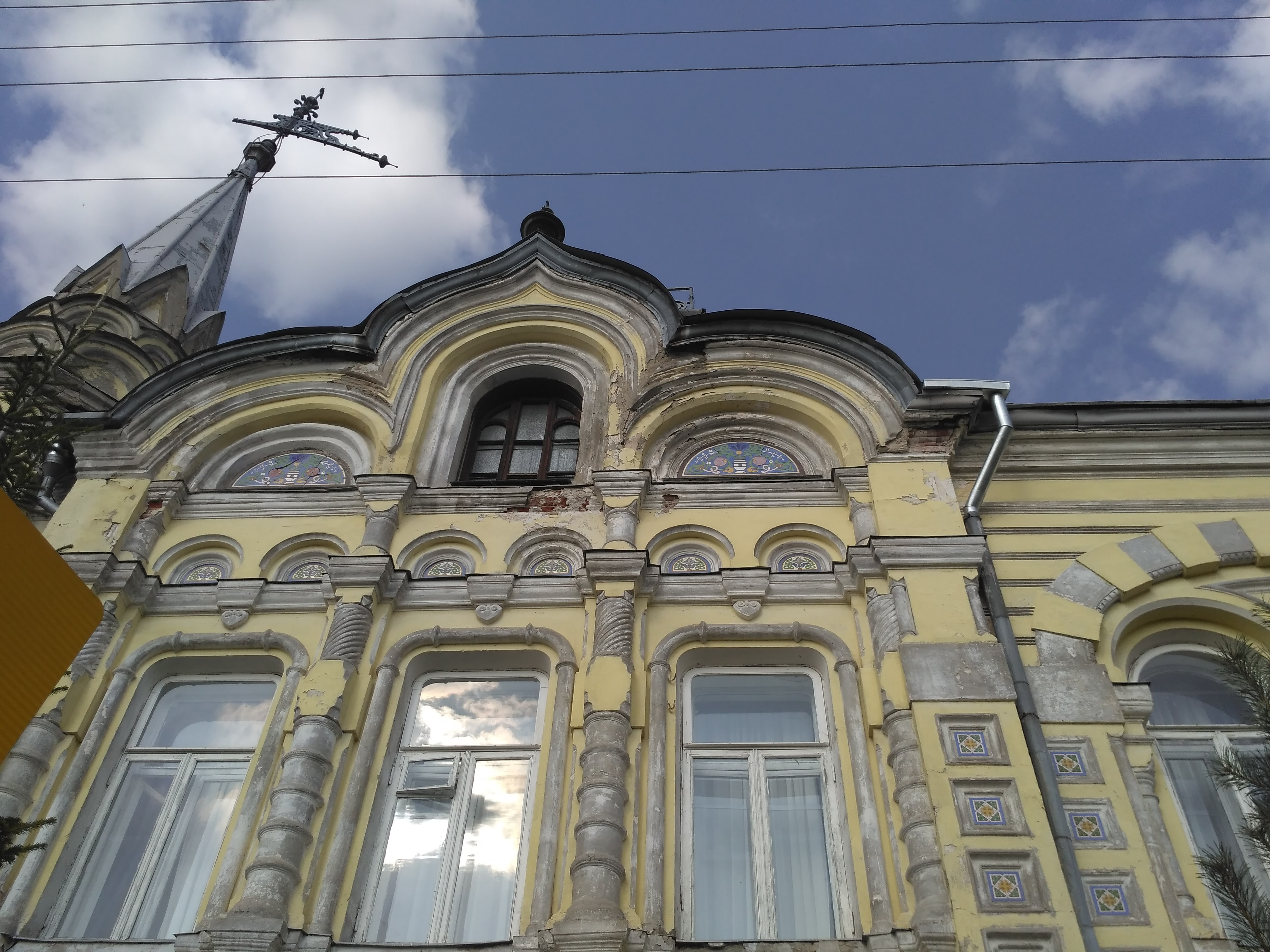 Главное здание усадьбы Локалова в селе Великом Гаврилов-Ямского района Ярославской области